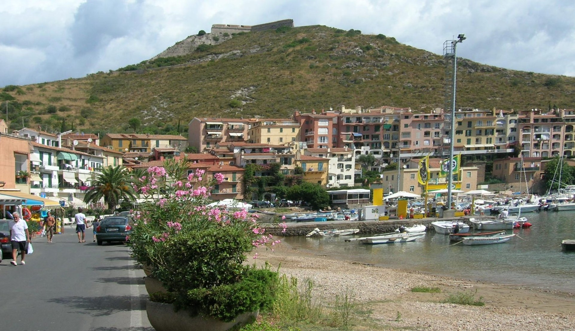 Porto Ercole, Panorama.